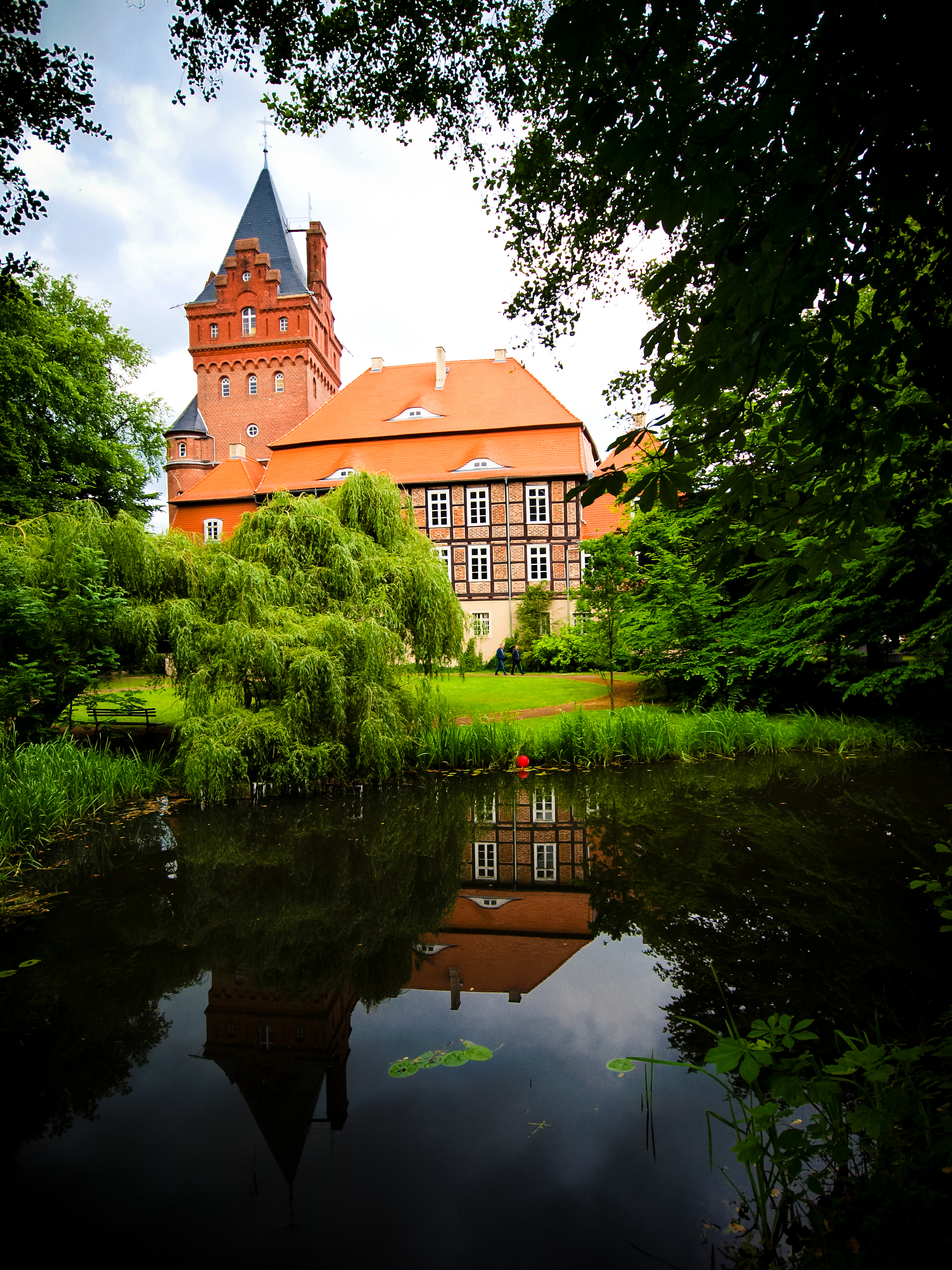 Die Plattenburg, von der alten Mühle aus gesehen.